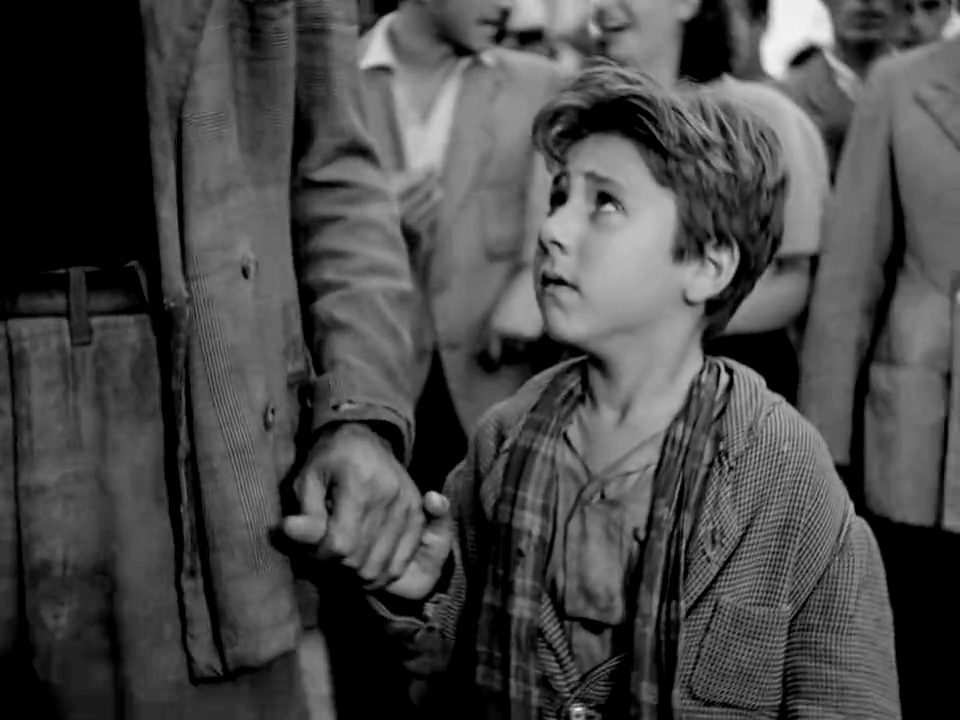 Screenshot dal film Ladri di biciclette, 1948